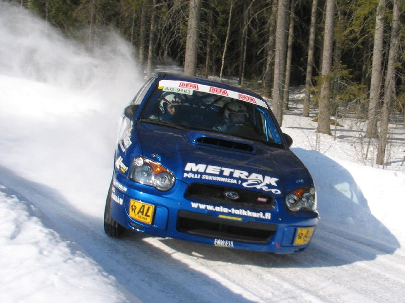 Jukka Ketomäki driving his Subaru Impreza WRX STi at the 2005 Peurunka Rally.